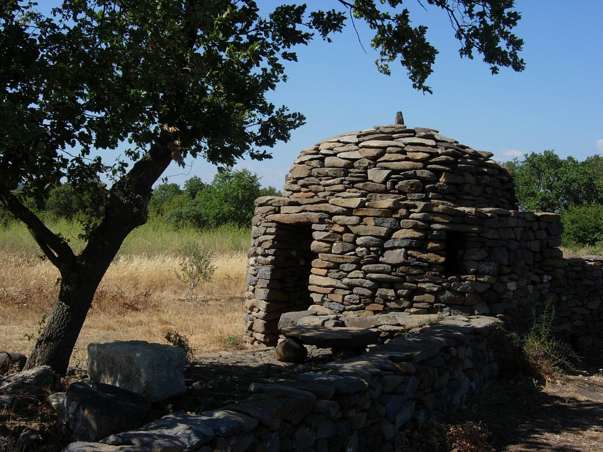 Capitelle de Caux (Hérault) en pierre basaltique, restaurée.